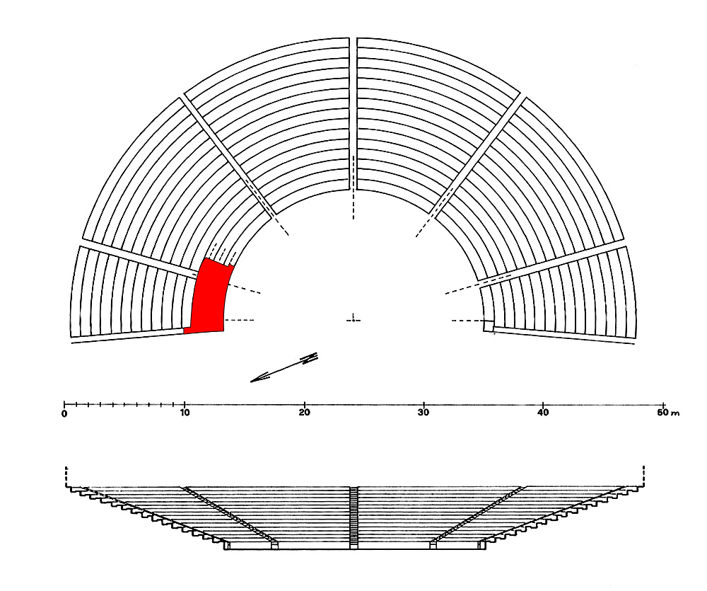 Ricostruzione della planimetria dell'Odèon/Ekklesiasterion nell'edificio di via XXIV maggio, evidenziato il rudere rimasto